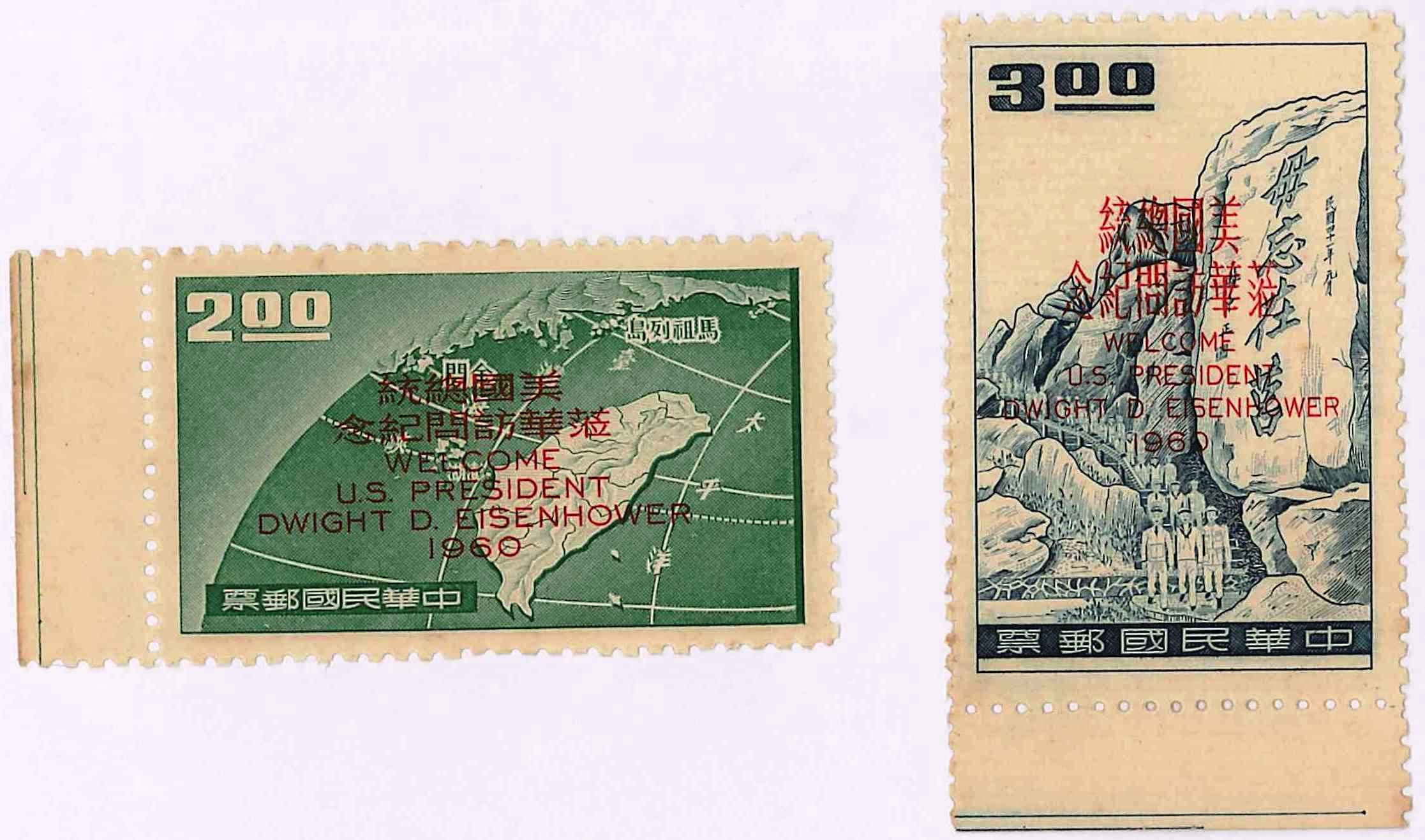 1960年4月18日中華民國交通部郵政總局發行之「艾森豪總統訪華紀念郵票」。